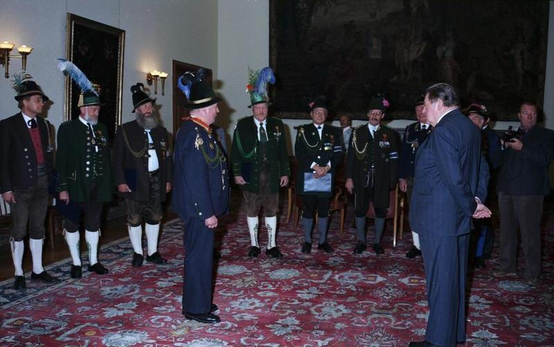 10.11.1987 Der bayrische Ministerpräsident Franz Josef Strauß überreicht das Verdienstkreuz des Verdienstordens der Bundesrepublik Deutschland an Gebirgsschützen im Prinz-Carl-Palais, seinem Amtssitz.